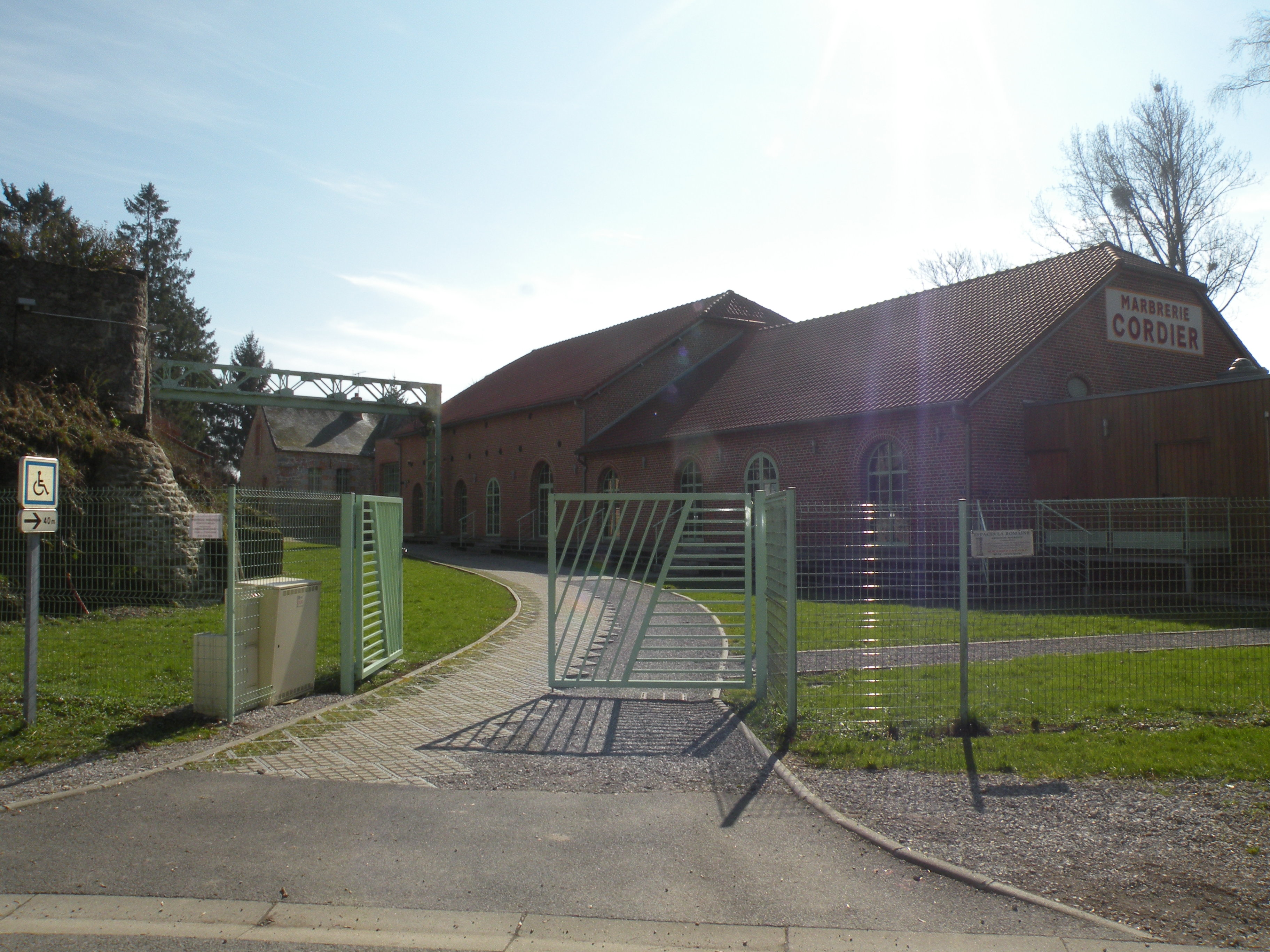 mediatheque de Flaumont-Waudrechies